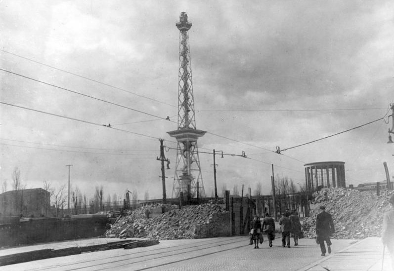 Berlin, Straßensperren Nähe Funkturm ADN-ZB/Archiv Das faschistische Deutschland im II. Weltkrieg 1939-45 Berlin wird am 1. Februar 1945 zum "Verteidigungsbereich" erklärt. Es werden Barrikaden errichtet, Stellungen und Panzergräben ausgehoben, Panzersperre in der Nähe des Funkturms, aufgenommen März 1945.